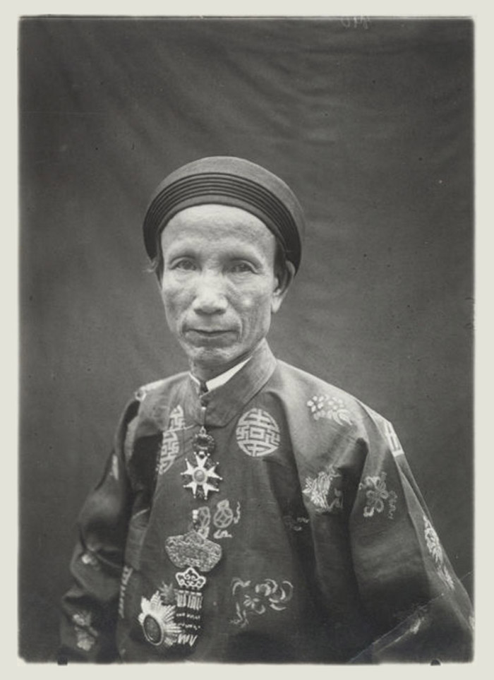 Nguyễn Hữu Bài